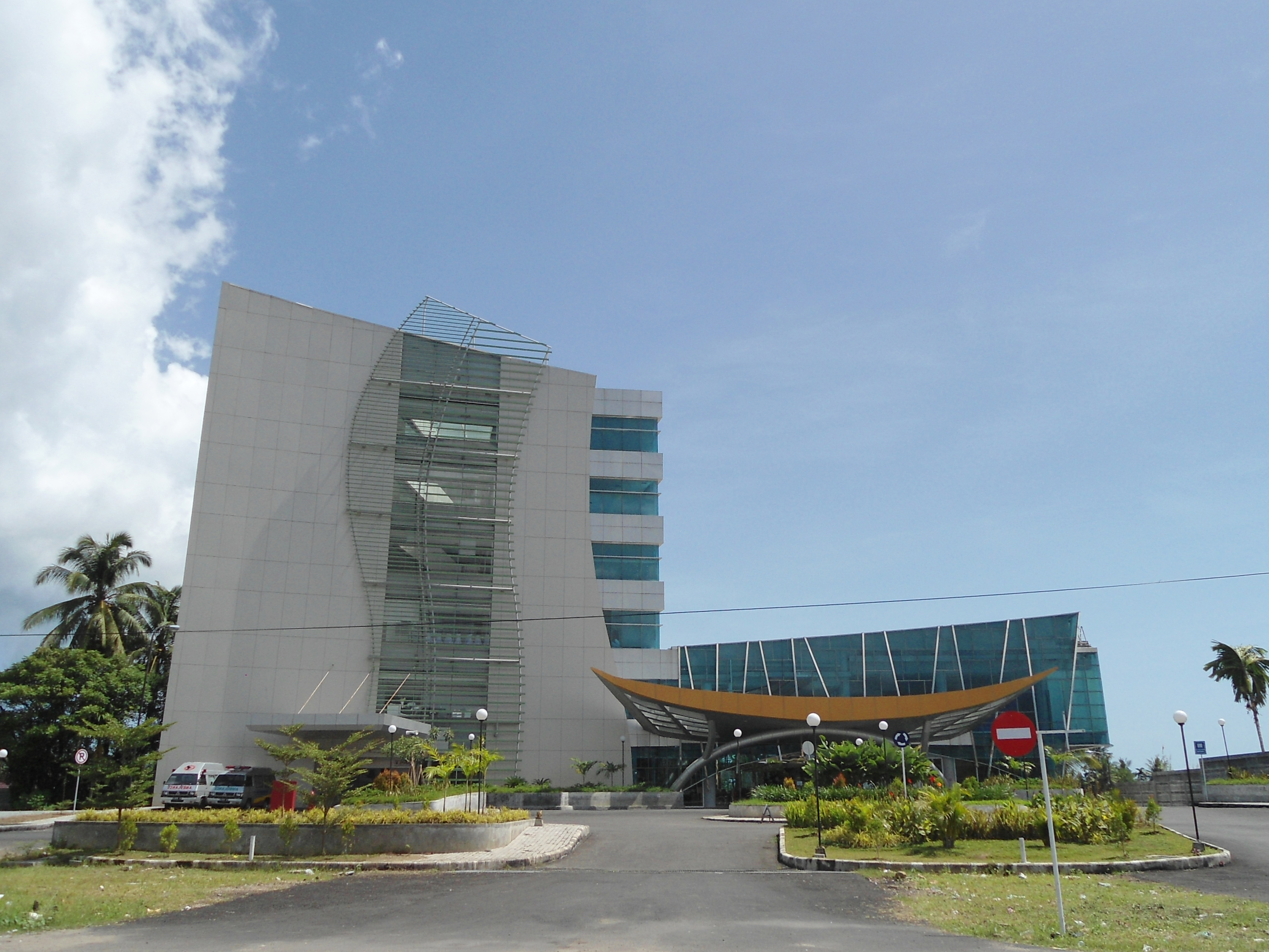 Rumah Sakit Semen Padang